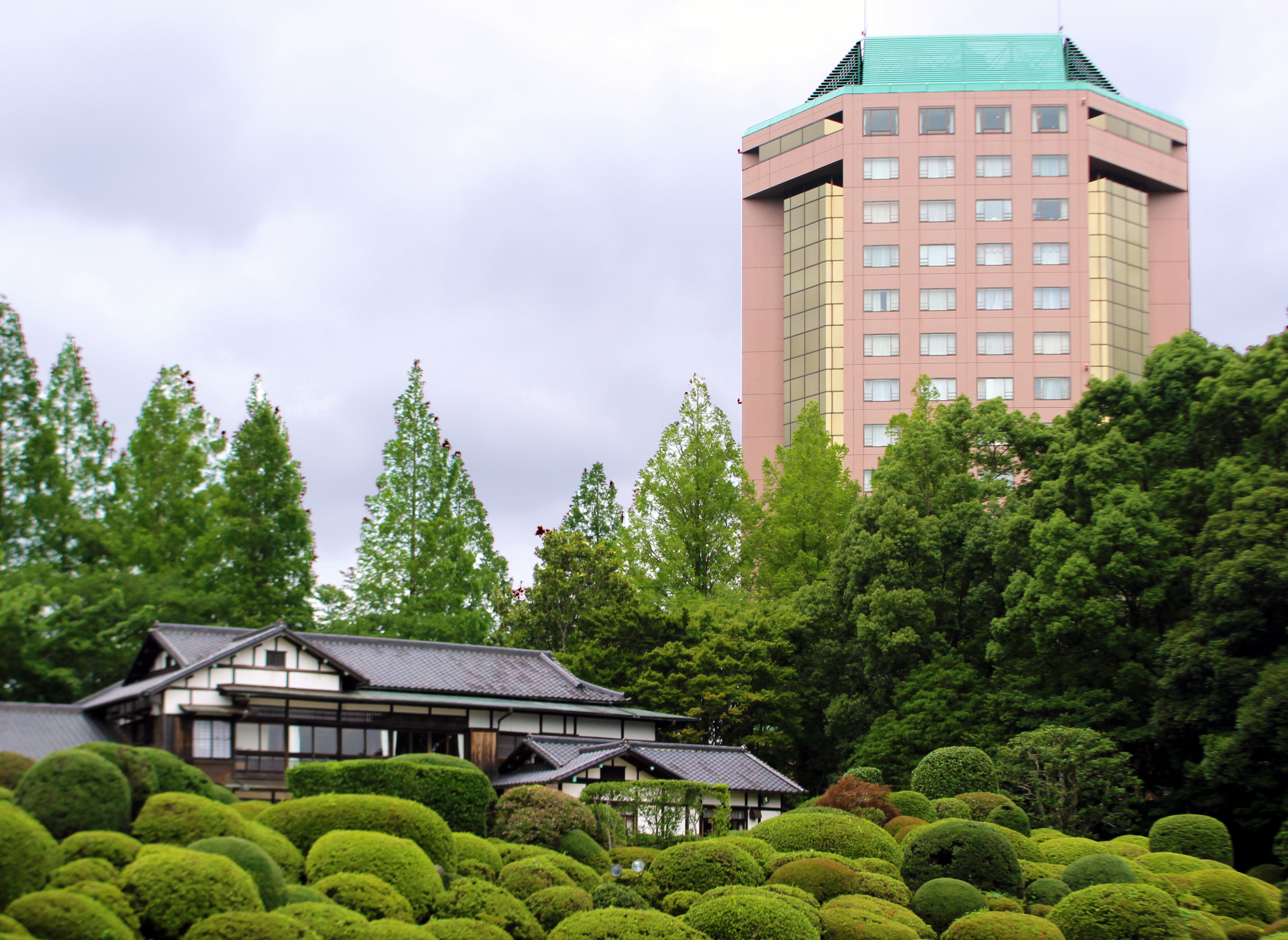 ホテルトリニティ書斎とスイス亭（リソル生命の森）